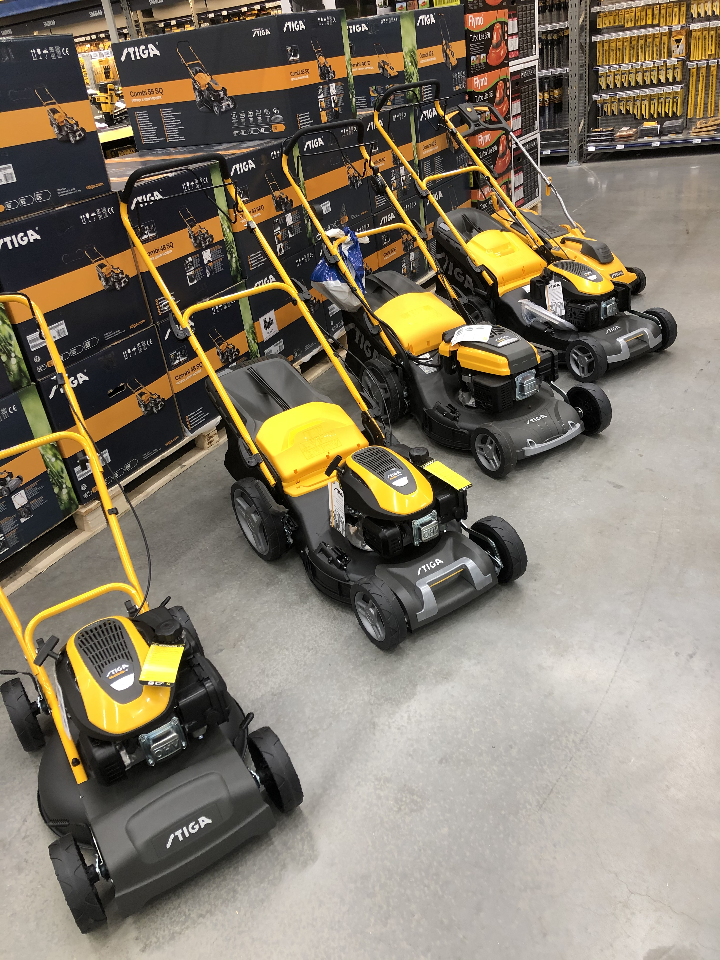 Stiga gressklippere, 2020.